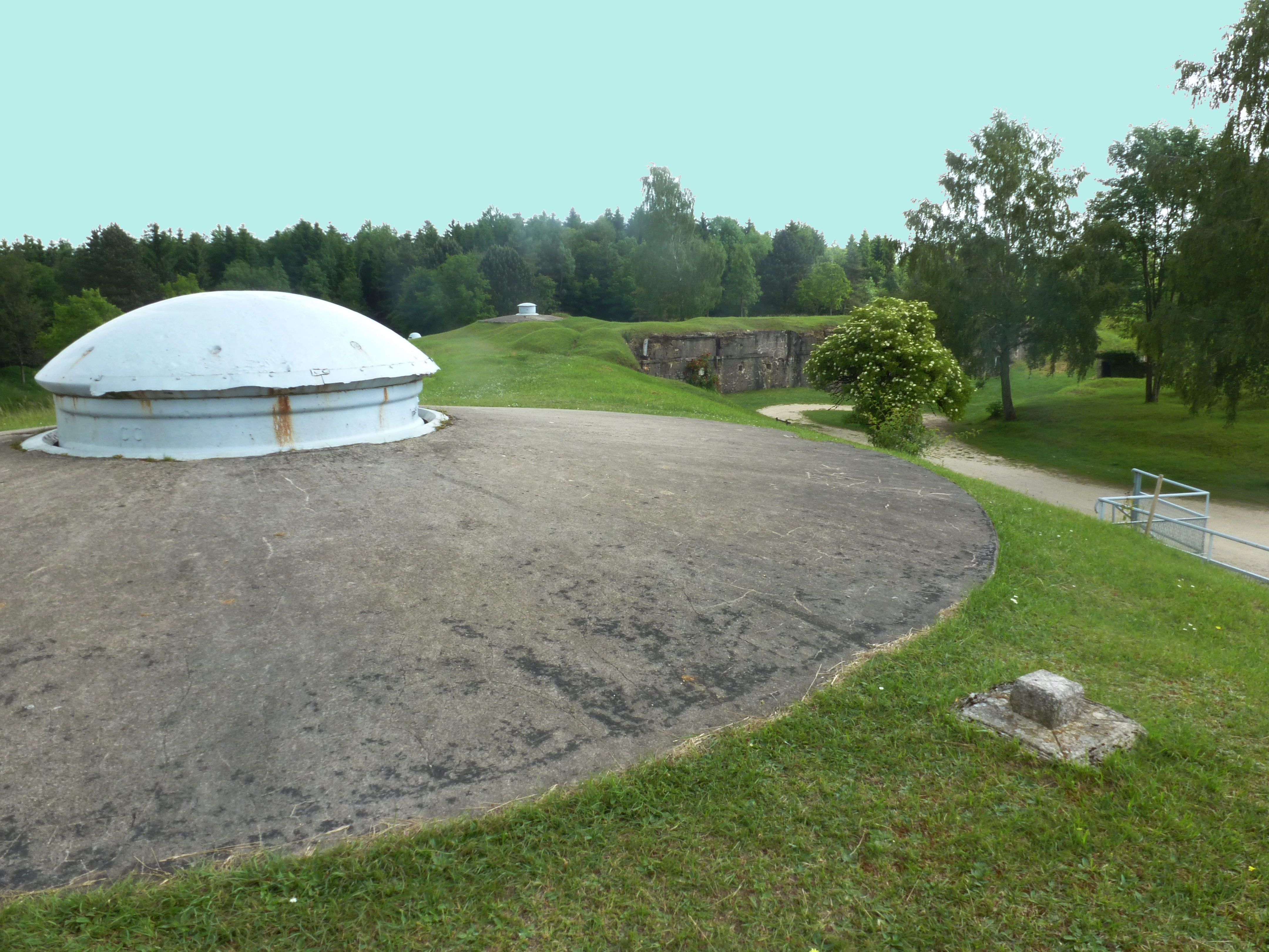 Le colonel de Vial chef de corps du 65 R.I. a défendu ce fort contre les grandes attaques allemandes de 1916